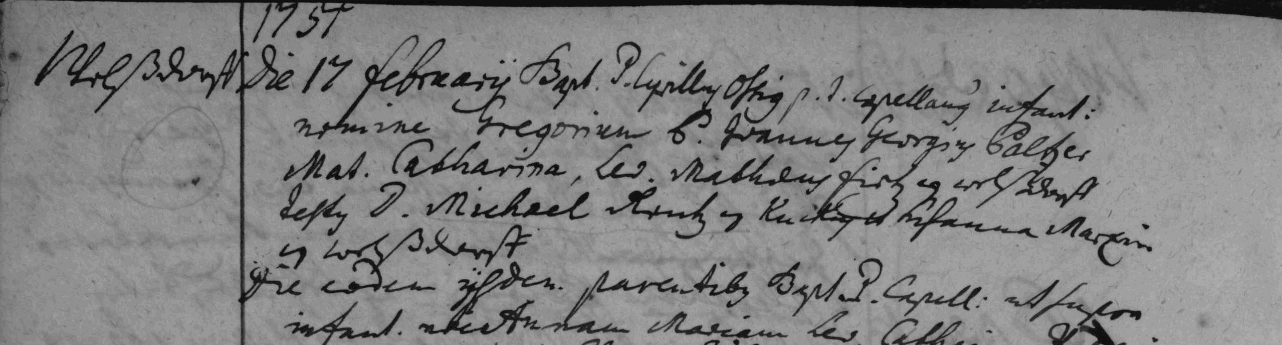 matriční zápis o křtu Řehoře Balzera (matrika N 1715-1754 farnost Choustníkovo Hradište (SOA Zámrsk))